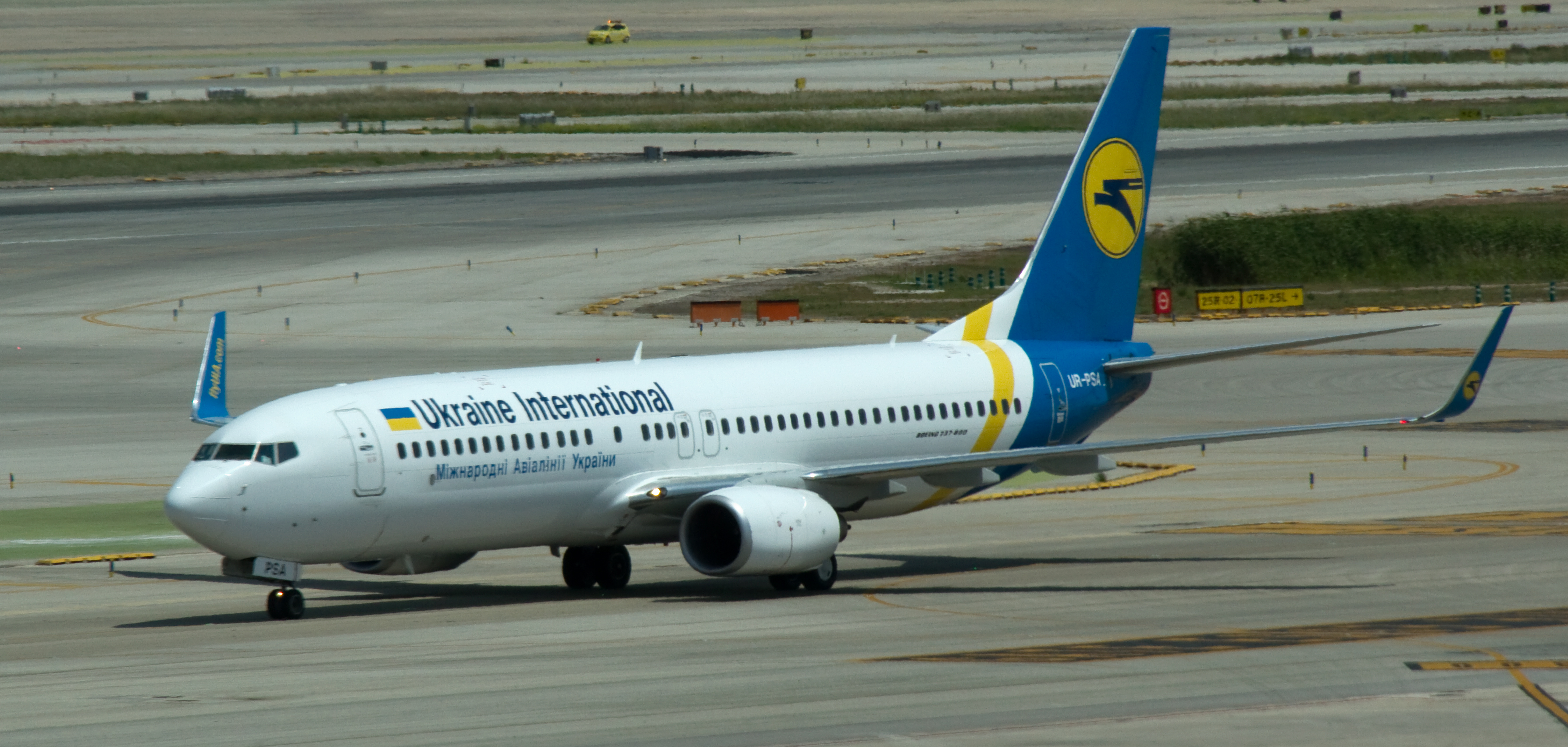 UR-PSA